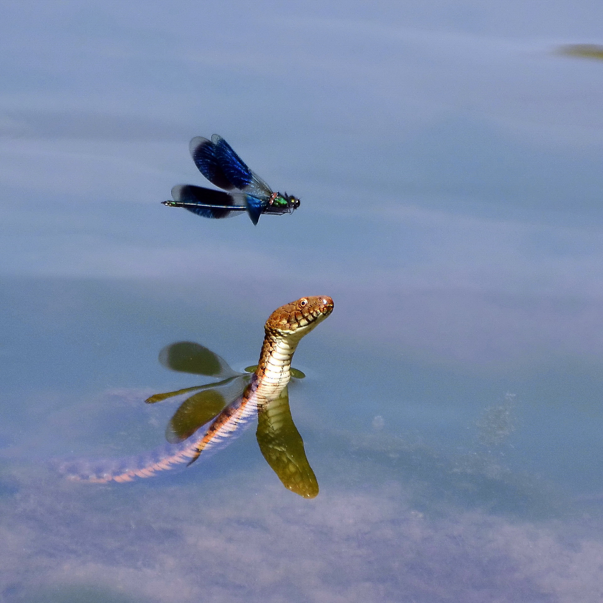 U Srbiji se ova zmija još naziva i potočara, ali i ribicara ili ribarica jer se pretežno hrani manjim ribama. Zbog njenih šara naziva se još i kockasta vodenjača. Primerak zmije na fotografiji dobio je nadimak "krilati reptil" jer je u trenutku fotografisanja iznad nje preleteo vilin konjic i ostavio odraz krila u vodi tačno na njenim ledjima. Ово је фотографија заштићеног природног добра у Србији под шифром: PIO11 This is a a photo of a natural area in Serbia with ID: PIO11